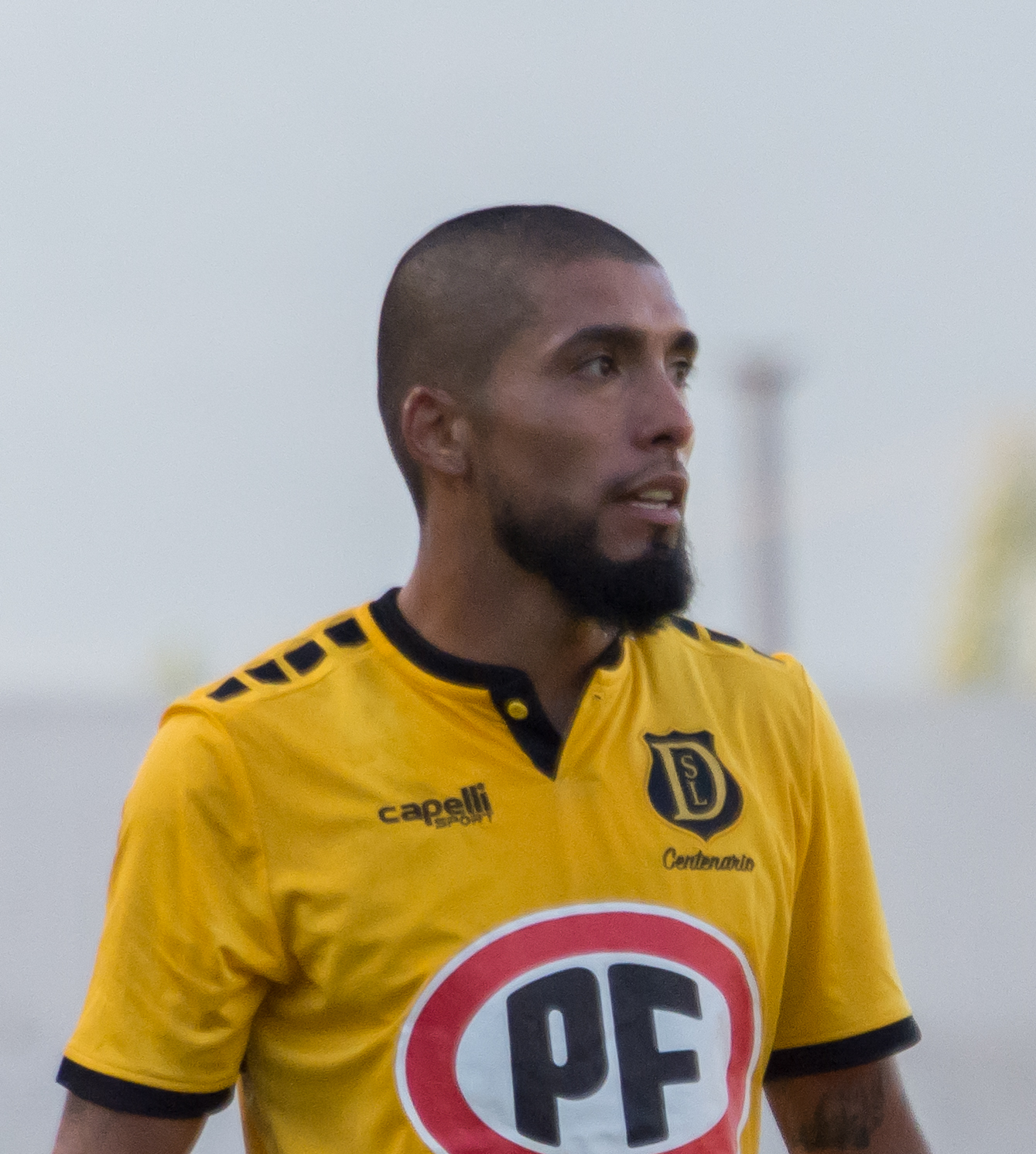 Álvaro Césped, San Luis v Santiago Wanderers, Estadio Municipal Lucio Fariña Fernández, Quillota, Región de Valparaíso, Chile.